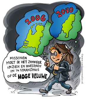 Cartoon about climate change